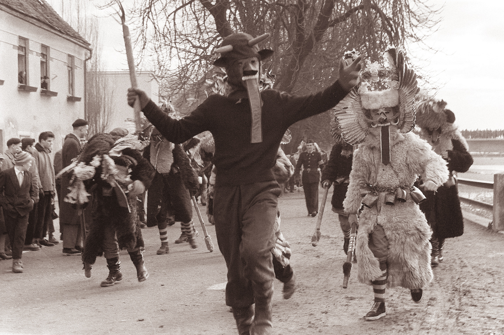 Ptujski pustni karneval in kurentovanje